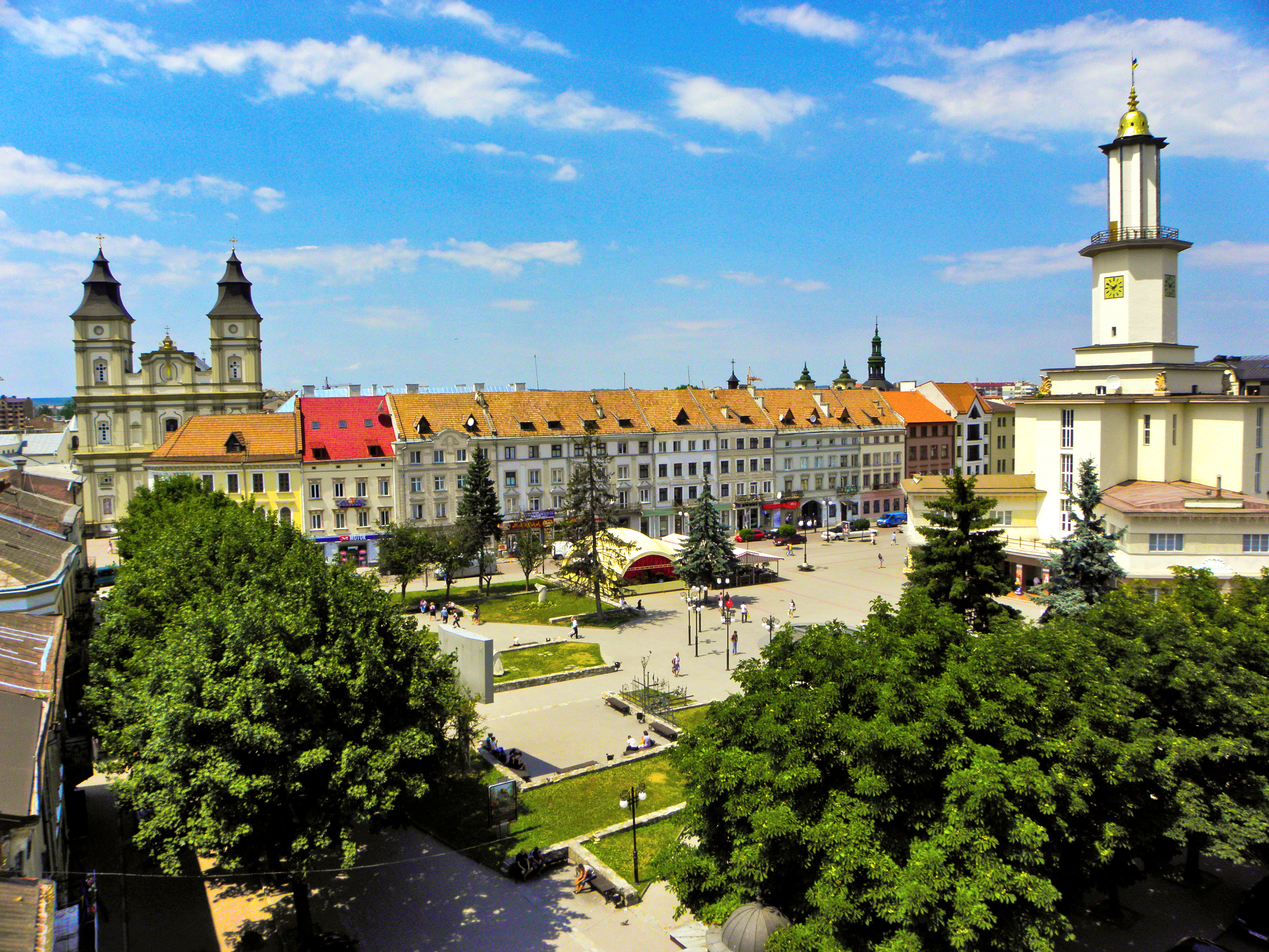 Ратуша (мур.) і пам'ятний знак ватажкові опришків В. Баюраку, Івано-Франківськ, вул. Галицька, 4а